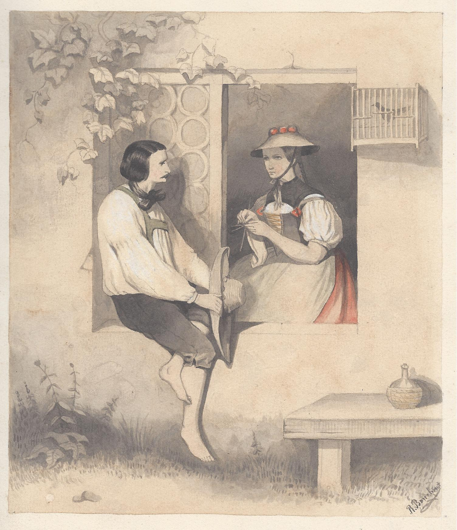 Lediges schwarzwälder Paar bei Hornberg. Kolorierte Bleistiftzeichnung von R. Bonehuyt nach Théodore Valerio, 1841. Vergl. die bei Gihaut fréres 1841 veröffentlichte Lithografie nach Théodore Valerio mit dem Titel: "La Conversation", zu der diese Zeichnung vermutlich die Vorlage bildete.